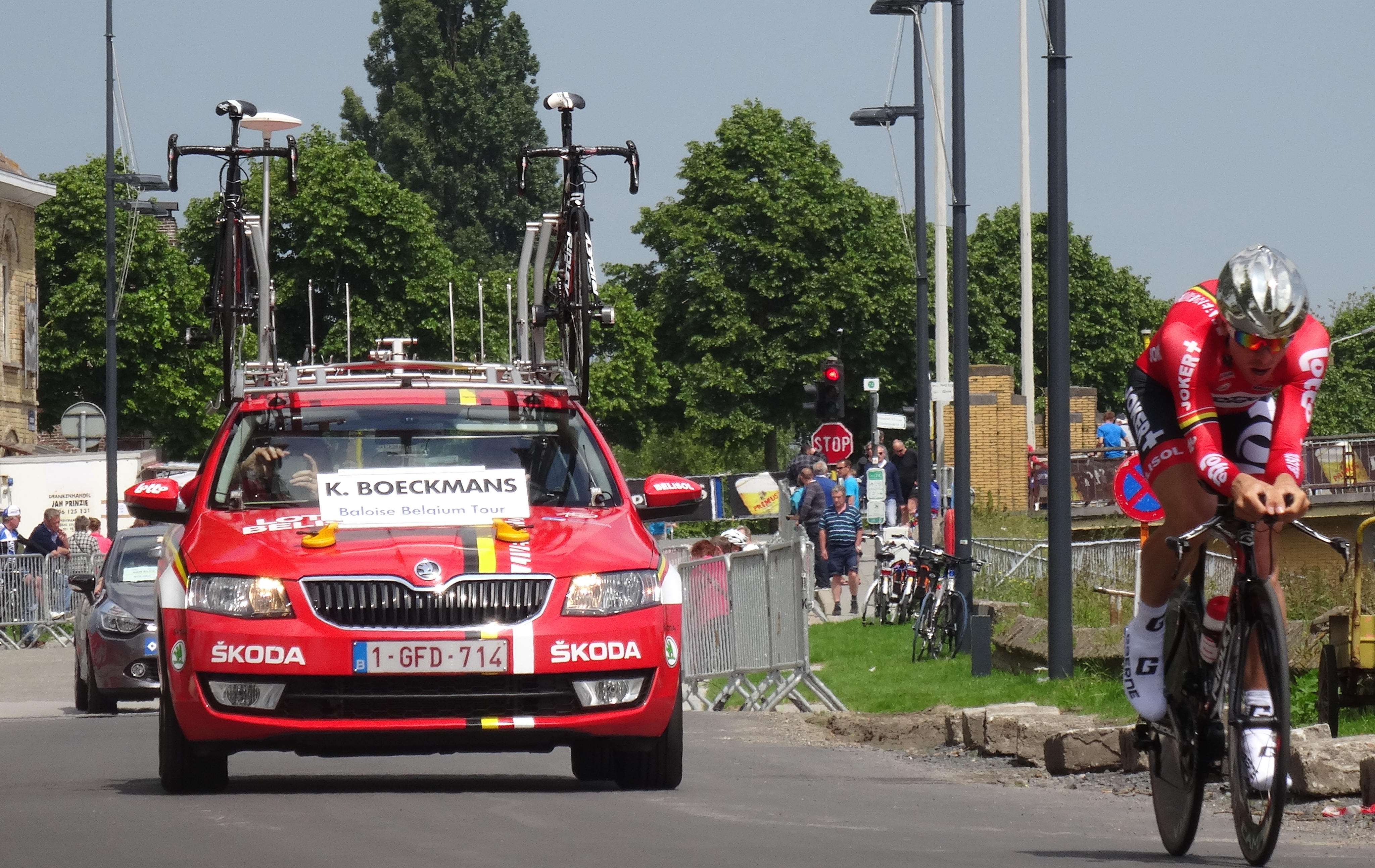 Reportage photographique réalisé le vendredi 30 mai à l'occasion du contre-la-montre individuel de la troisième étape du Tour de Belgique 2014 à Dixmude, Belgique.